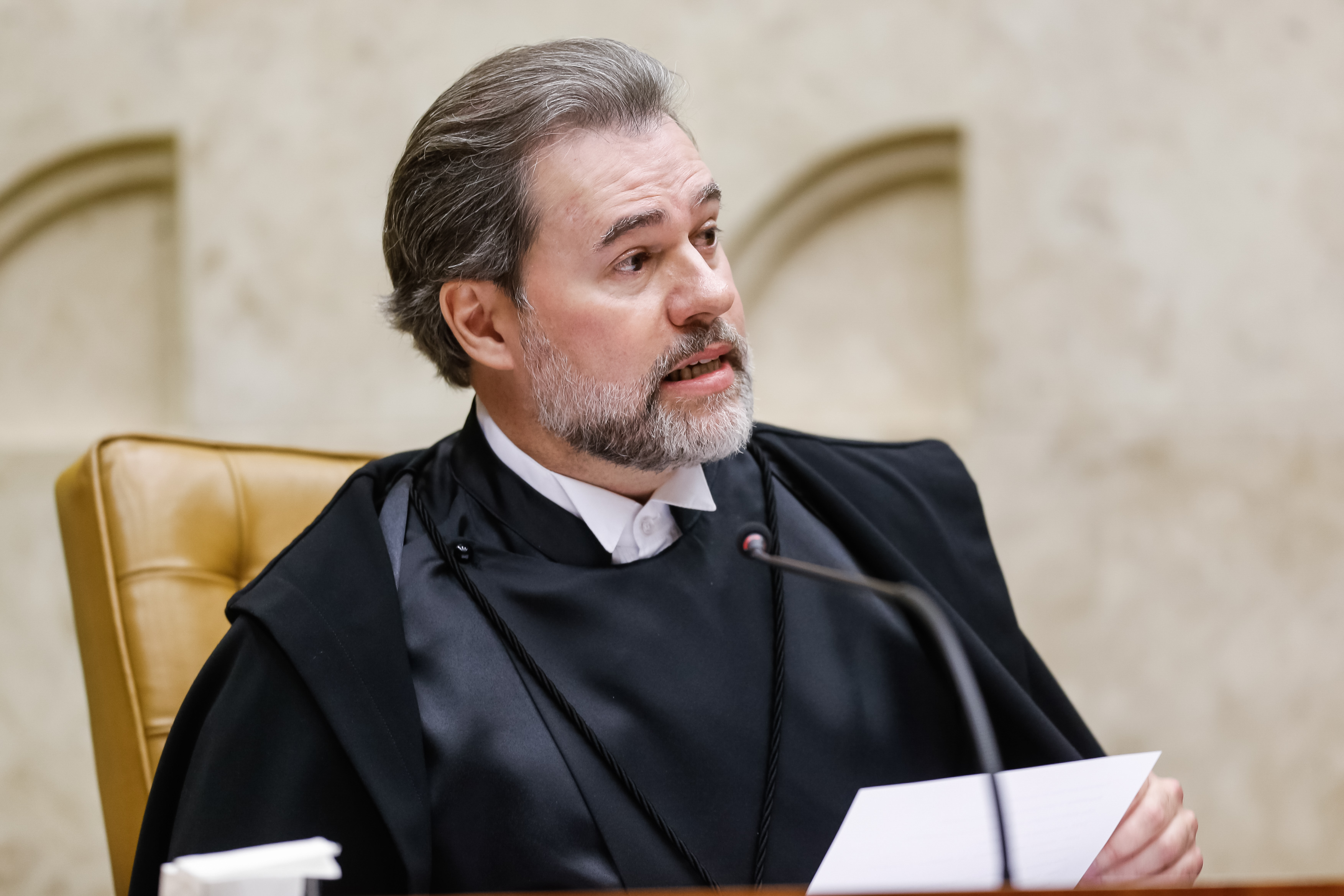 (Brasília - DF, 13/09/2018) Palavras do Presidente do Superior Tribunal Federal, Ministro Dias Toffoli.